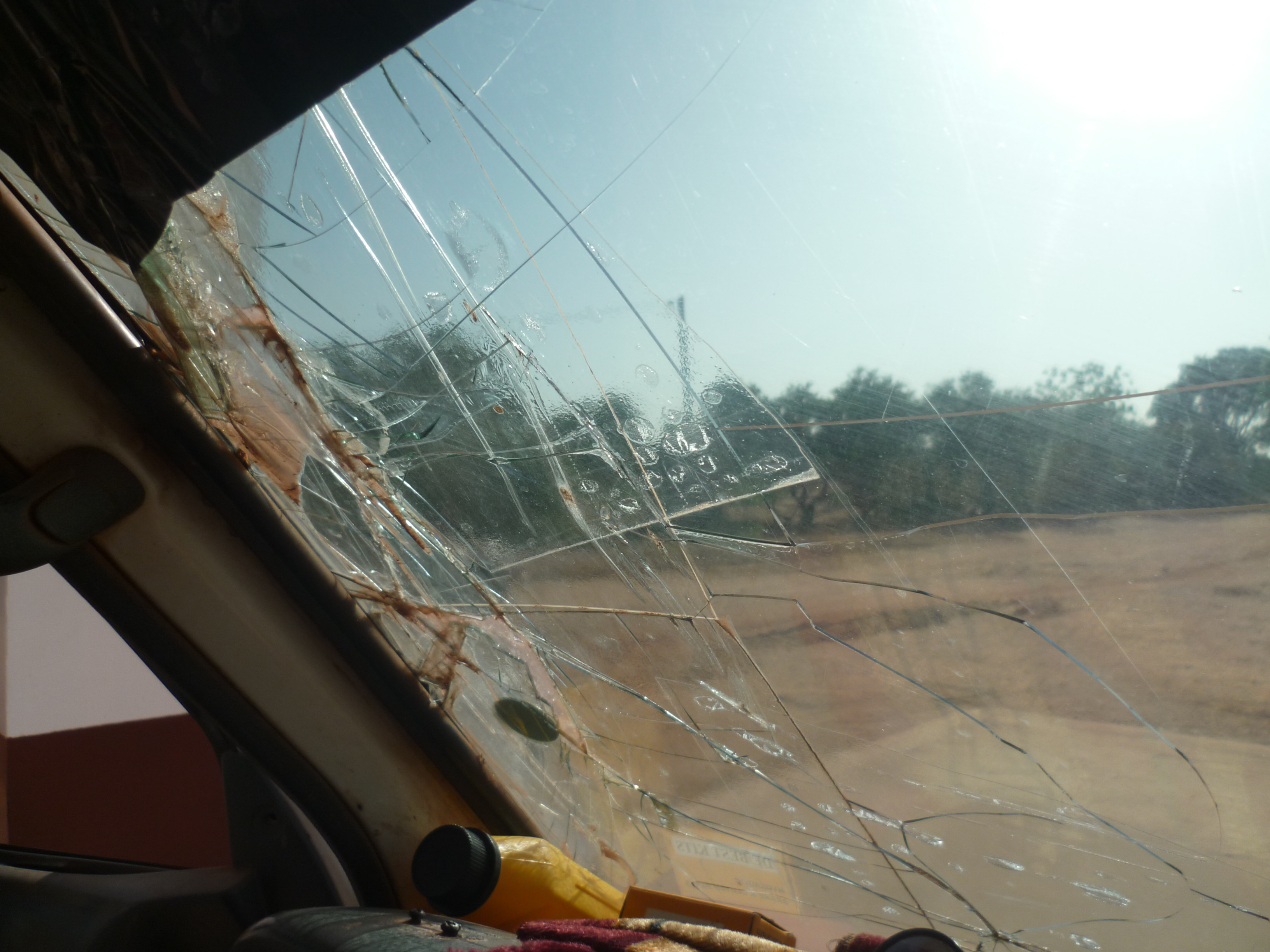 Tout est bon pour réparer un pare brise ! Surtout quand on ne peut pas s'en payer un nouveau qui de toutes les façons ne durera pas longtemps, car non origina. Et puis comme le véhicule ne se fait plus depuis longtemps, il y a très peu de chances d'en trouver un de valable. This is an image with the theme "Africa on the Move or Transport" from: Burkina Faso